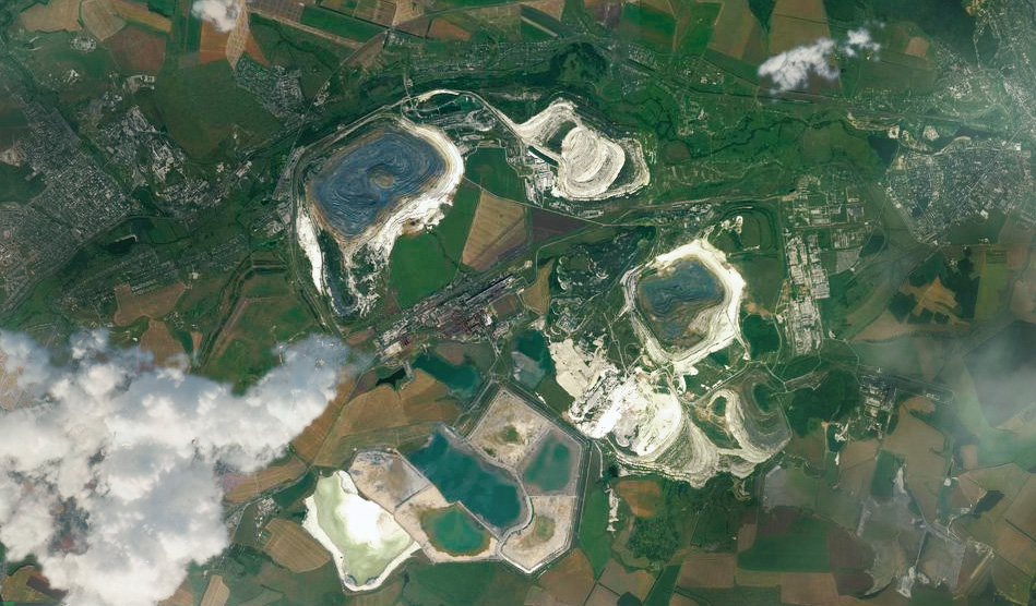 Лебединский и Стойленский карьеры по добыче железной руды (тёмные). Слева — г. Губкин, справа — г. Старый Оскол.